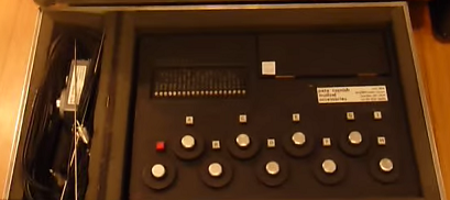 Dieses Bild von Eric Clapton's Pete Cornish Fußschalter habe ich im Jahr 2011 während einer Preview der Bonhams Auktion gemacht. Bearbeitet habe ich es 2015 - daher das abweichende Erstellungsdatum.